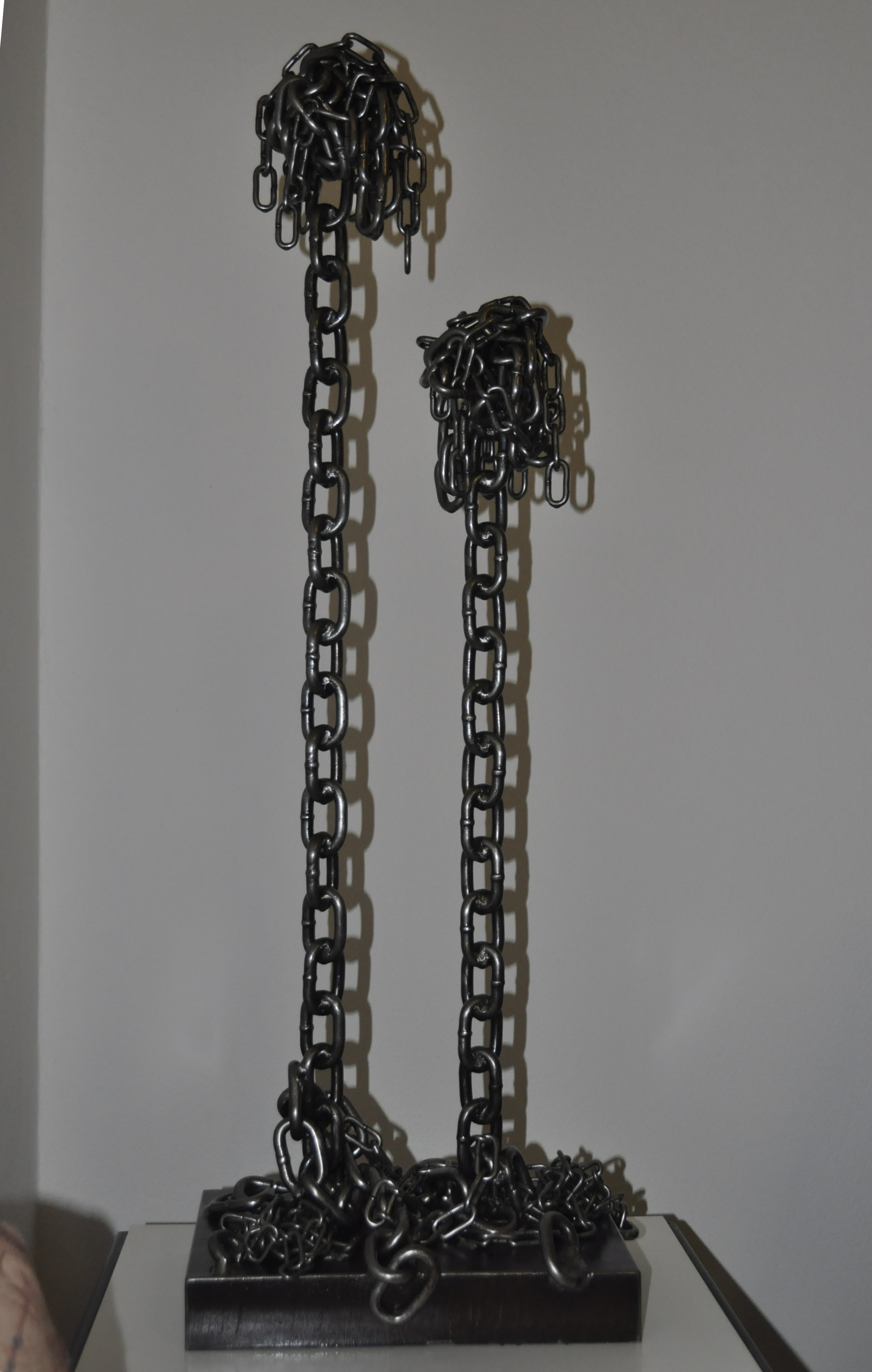 réception chez le grand sculpteur de Batna Rachid Mouffouk